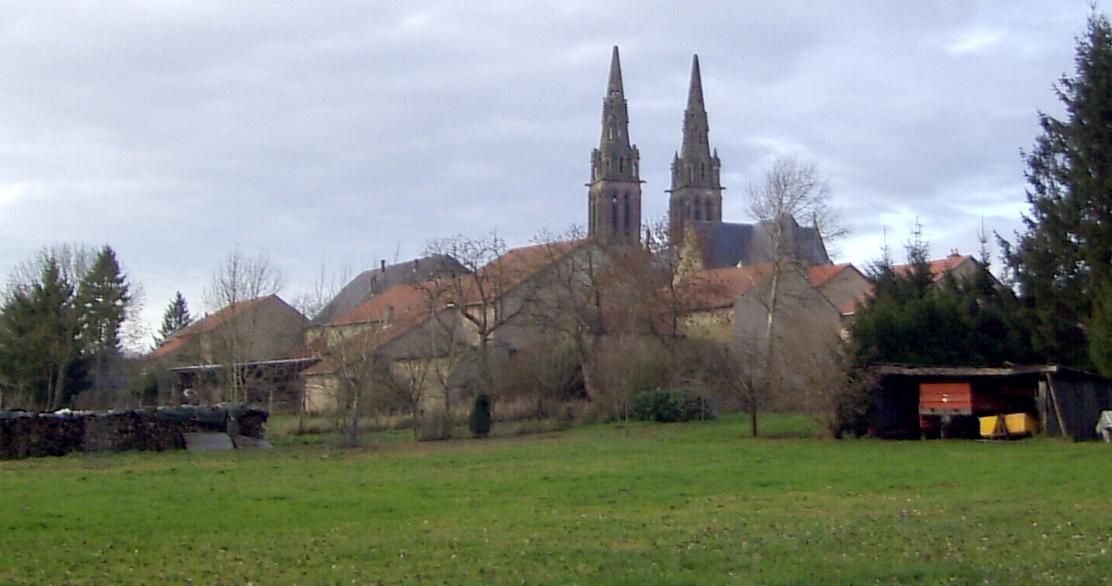 Vue depuis le sud-est sur Munster